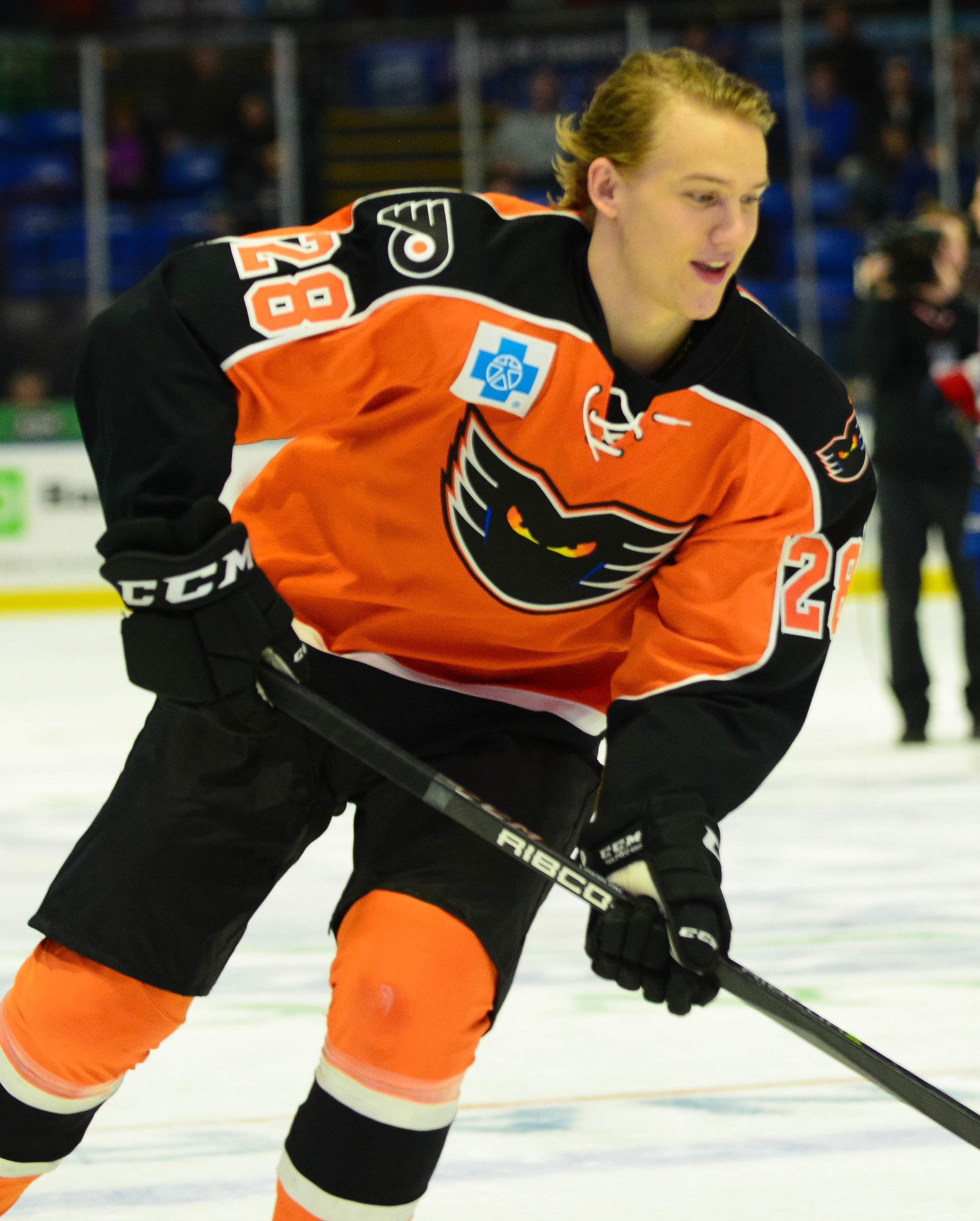 (Bryan Peck/ AHL)